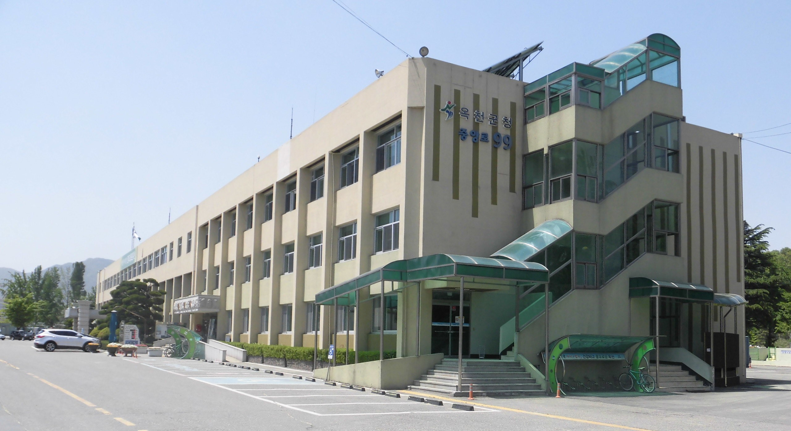 충청북도 옥천군에 있는 옥천군청